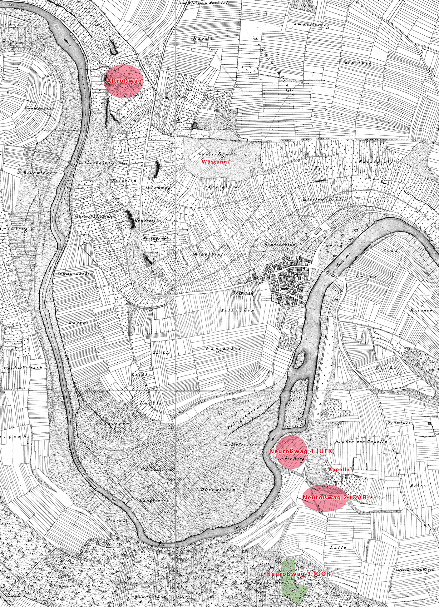 Standort der Burg Altroßwag und Standortalternativen für Burg Neuroßwag auf der württ. Urflurkarte von 1833: gemäß Flurnamen der Urflurkarte (UFK) laut Paulus (OAB) von Gemeinschaft Ortsbild Roßwag (GOR) vermutet